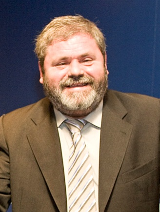 El empresario invidente Miguel Duran. Fue presidente de Telecinco y Onda Cero, director de la ONCE y cabeza de lista de Libertas-Ciudadanos de España, en las elecciones al Parlamento Europeo de 2009.